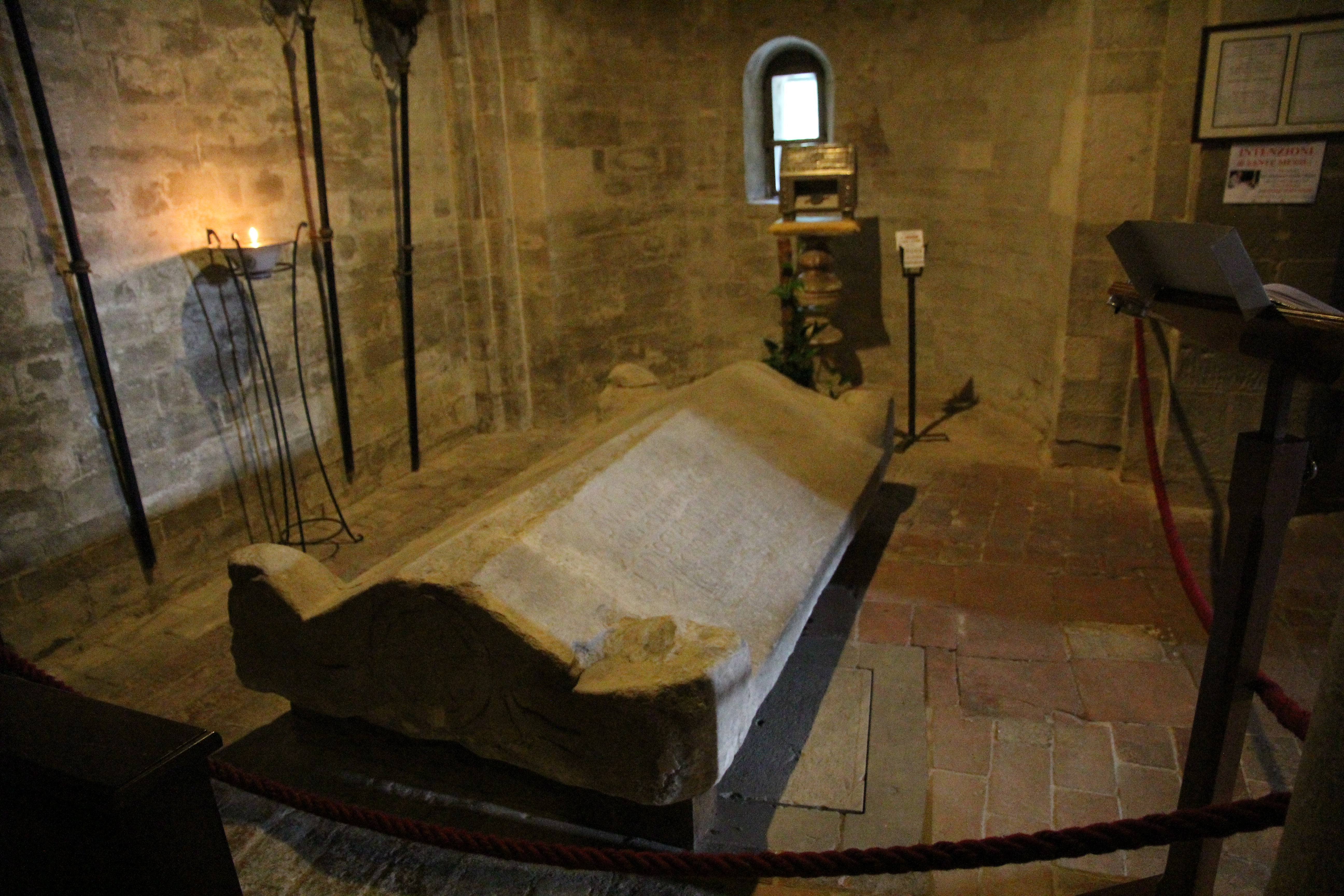 San Leo, cattedrale di San Leone